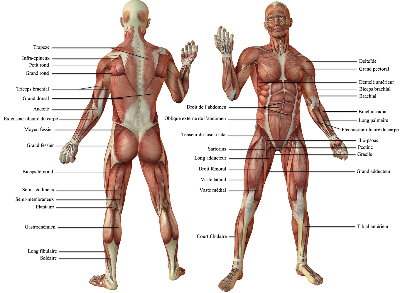 Vue antérieure et postérieure des muscles du corps humain